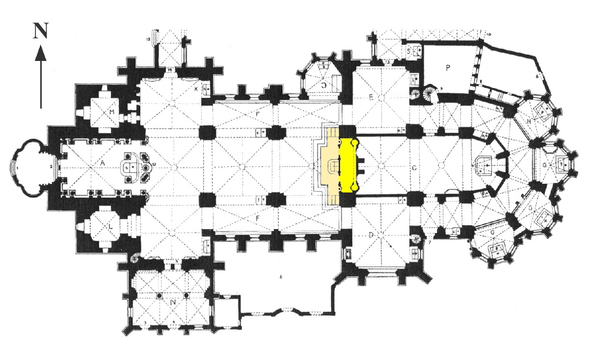 Bearbeiteter Grundriss mit Hervorhebung des Standortes des ehemaligen Lettners